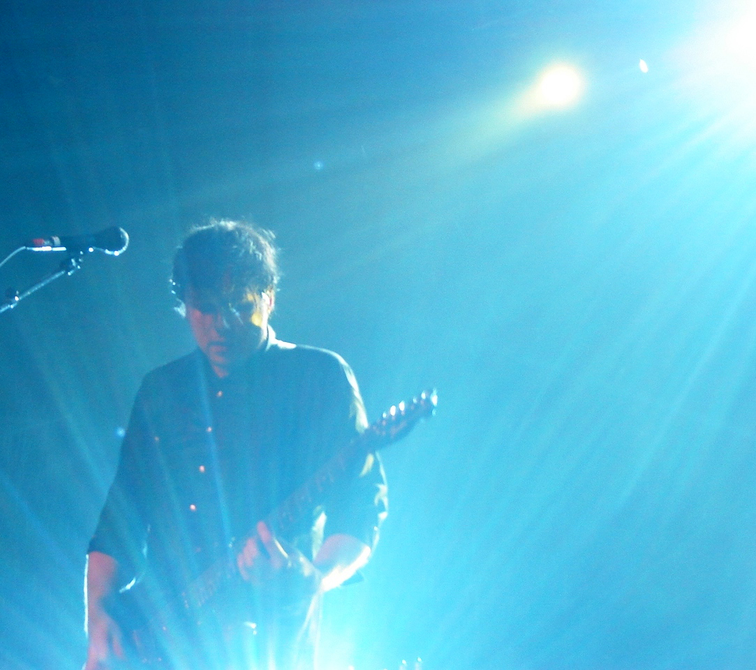 Jim Adkins at Schlachthof, Wiesbaden, Germany.